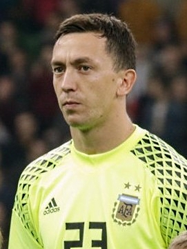 Agustín Marchesín, Javier Mascherano, Cristian Pavón, Germán Pezzella